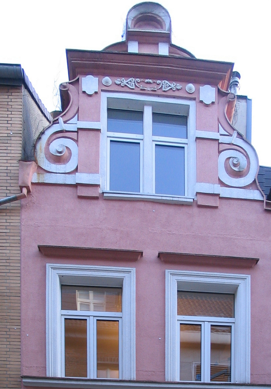 Düsseldorf, Wallstraße 31 a.